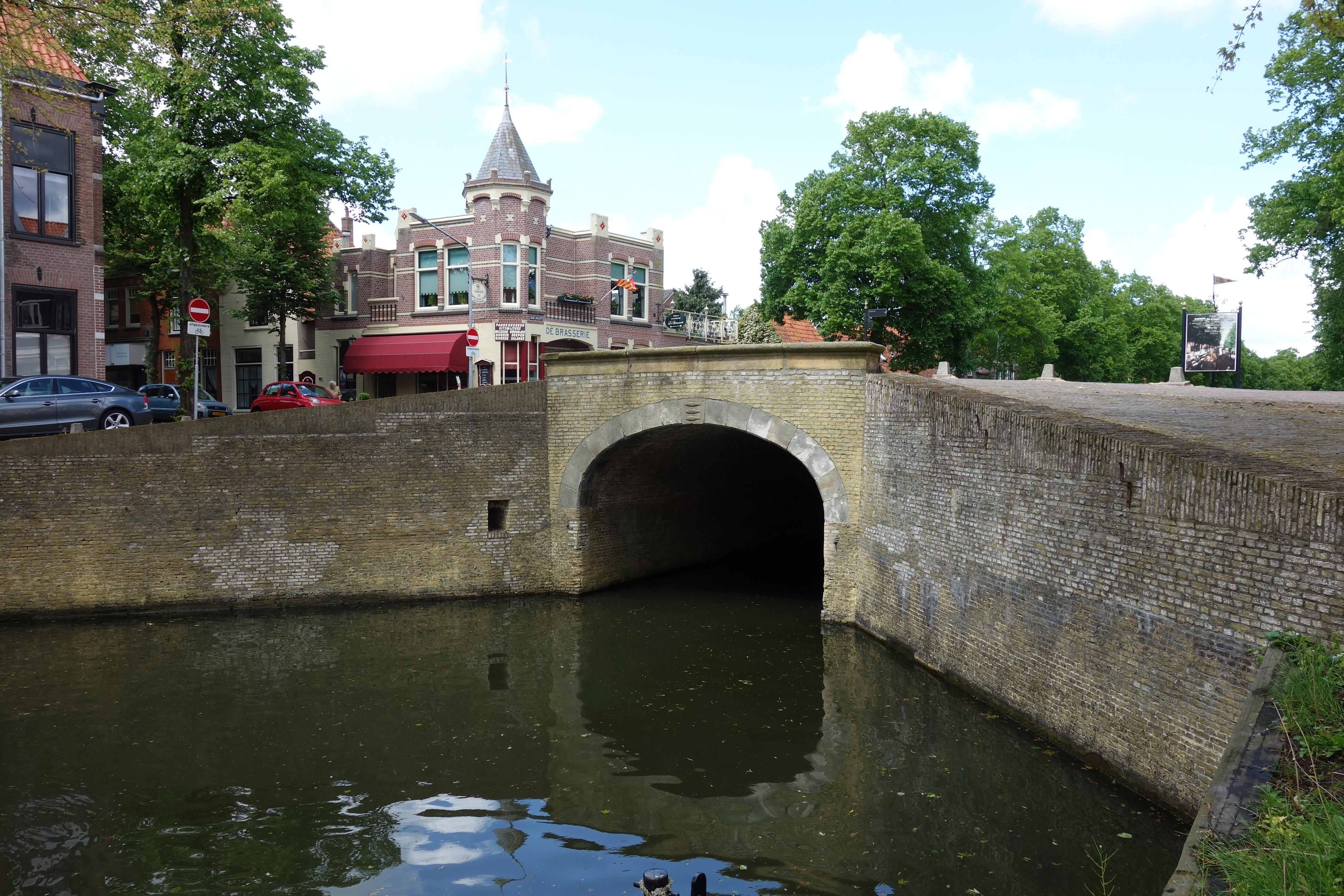 Gemetselde boogbrug over de Oudegracht